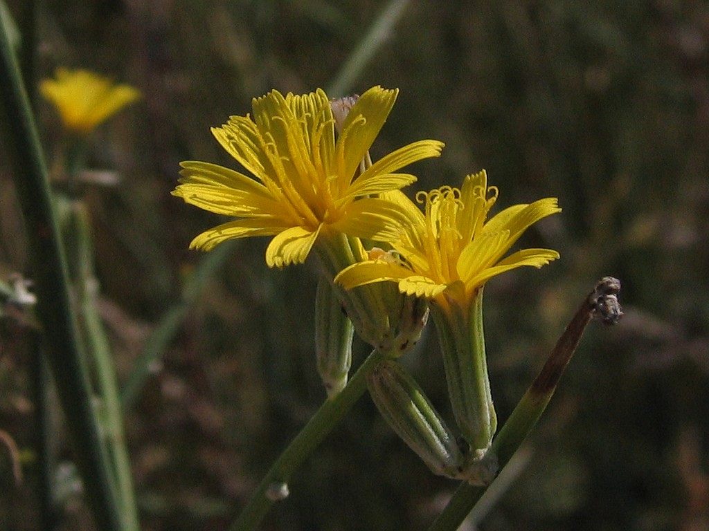 Capítols de chondrilla juncea L.